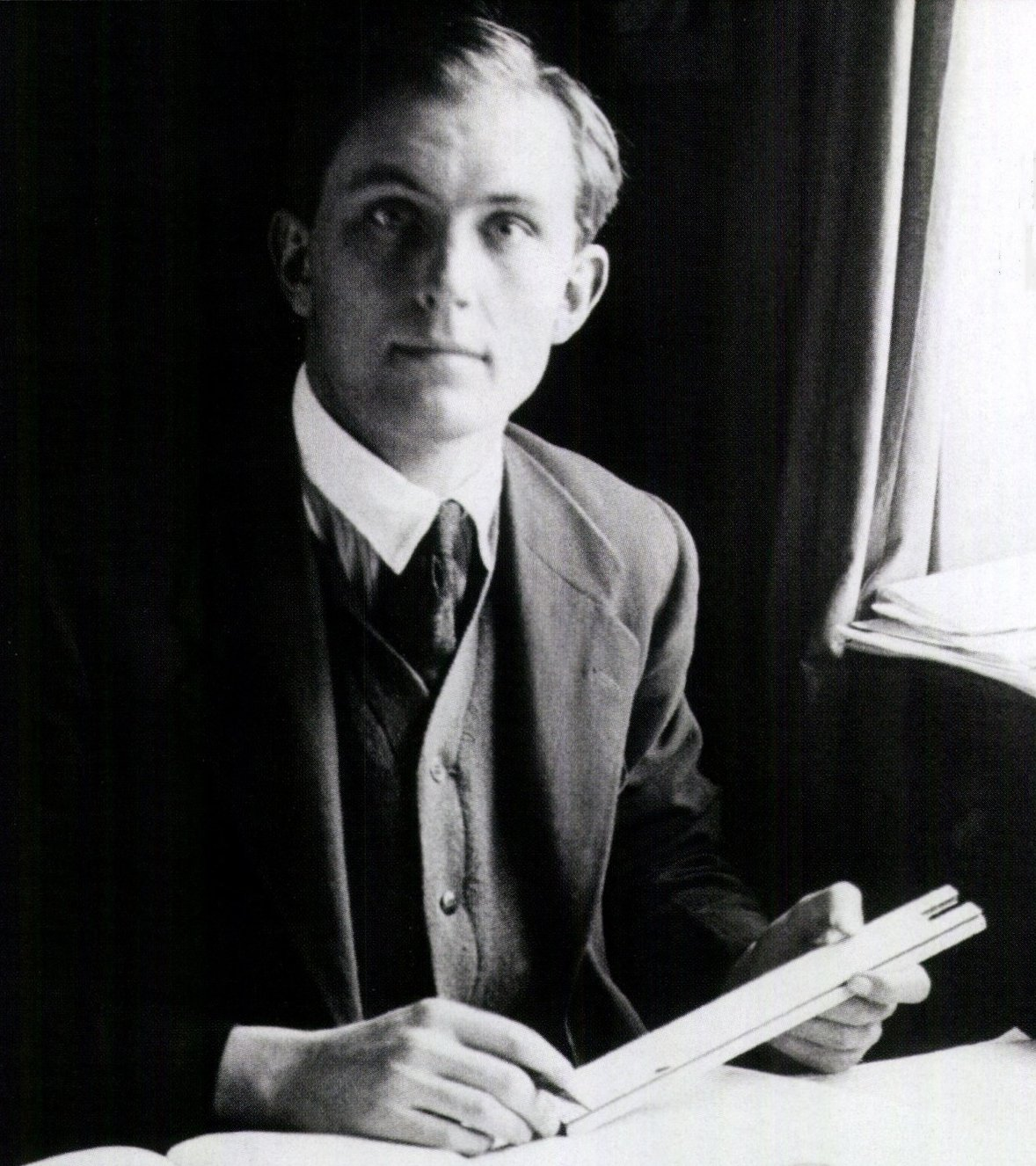 Amherst Villiers (1900-1991)